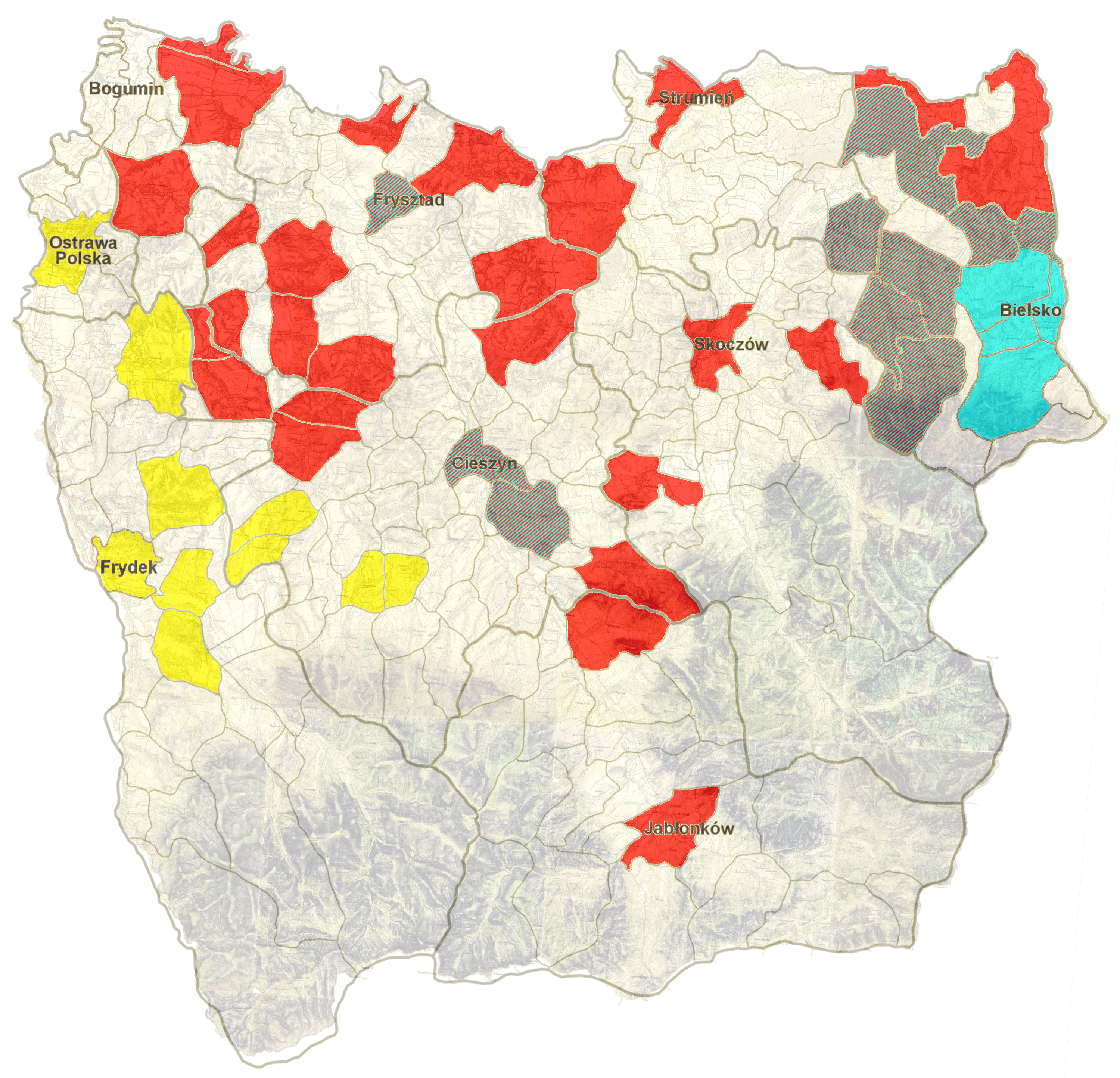 Języki kazań odzwierciedlające te używane przez większość parafian poszczególnych parafii rzymsko-katolickich na Śląsku Cieszyńskim w wieku XVII, na podstawie poreformacyjnych raportów sporządzonych przez niemieckich wizytatorów biskupich z Wrocławia. Są o tyle wiarygodne, że nie ukrywają nawet wstydliwych faktów z prywatnego życia księży. O tyle ciekawe, że zostały sporządzone na długo przed XIX-wiecznymi wzmożonymi migracjami robotników z Galicji do zagłębia karwińskiego, czy urzędników z Czech i krajów niemieckojęzycznych, jak również przed działalnością tzw. budzicieli narodowych jak Paweł Stalmach. W dobie XIX-wiecznych konfliktów narodowościowych powoływano się głównie na wyniki spisów z lat 1880/1910. Raporty z wizytacji pokazują podobne do nich stosunki językowe, z ciekawymi różnicami, np. w Szonowie, Gnojniku i Trzycieżu w 17. wieku kazania były po morawsku/czesku a w poł. 19. wieku po polsku. Nie pokrywają się one z granicami dekanatów (np. Bludowice w dekanacie frydeckim były polskojęzyczne). Parafie obejmowały oczywiście więcej miejscowości, co nie zostało oznaczone na mapie, przez przypadek pominąłem niektóre parafie jak Dębowiec. Prawdopodobnie można mapę rozwinąć analizując szczegółowiej wspomniane raporty do poziomu tej mapy (Zasięg mowy polskie na Śląsku około połowy XVII wieku. Opracował Tadeusz Ładogórski w: Historia Śląska pod redakcją Karola Maleczyńskiego, Wrocław 1966, Tom 1, cz. 3.), opracowanej na tych samych źródłach. żółty - morawski/czeski, czerwony - polski (w miejscowej odmianie), niebieski - niemiecki szachowany - mieszany polski/niemiecki Synteza z rozdziału Mieszkańcy Księstwa" (s. 177-196) w: Śląsk Cieszyński w początkach czasów nowożytnych (1528-1653). Idzi Panic (redakcja). Cieszyn: Starostwo Powiatowe w Cieszynie, 2011. ISBN 978-83-926929-5-9. Tło: File:Cieszyn, Mapy i plany - fotopolska.eu (22589).jpg